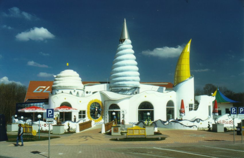 Kunstraststätte Illertal-Ost, Vorderansicht